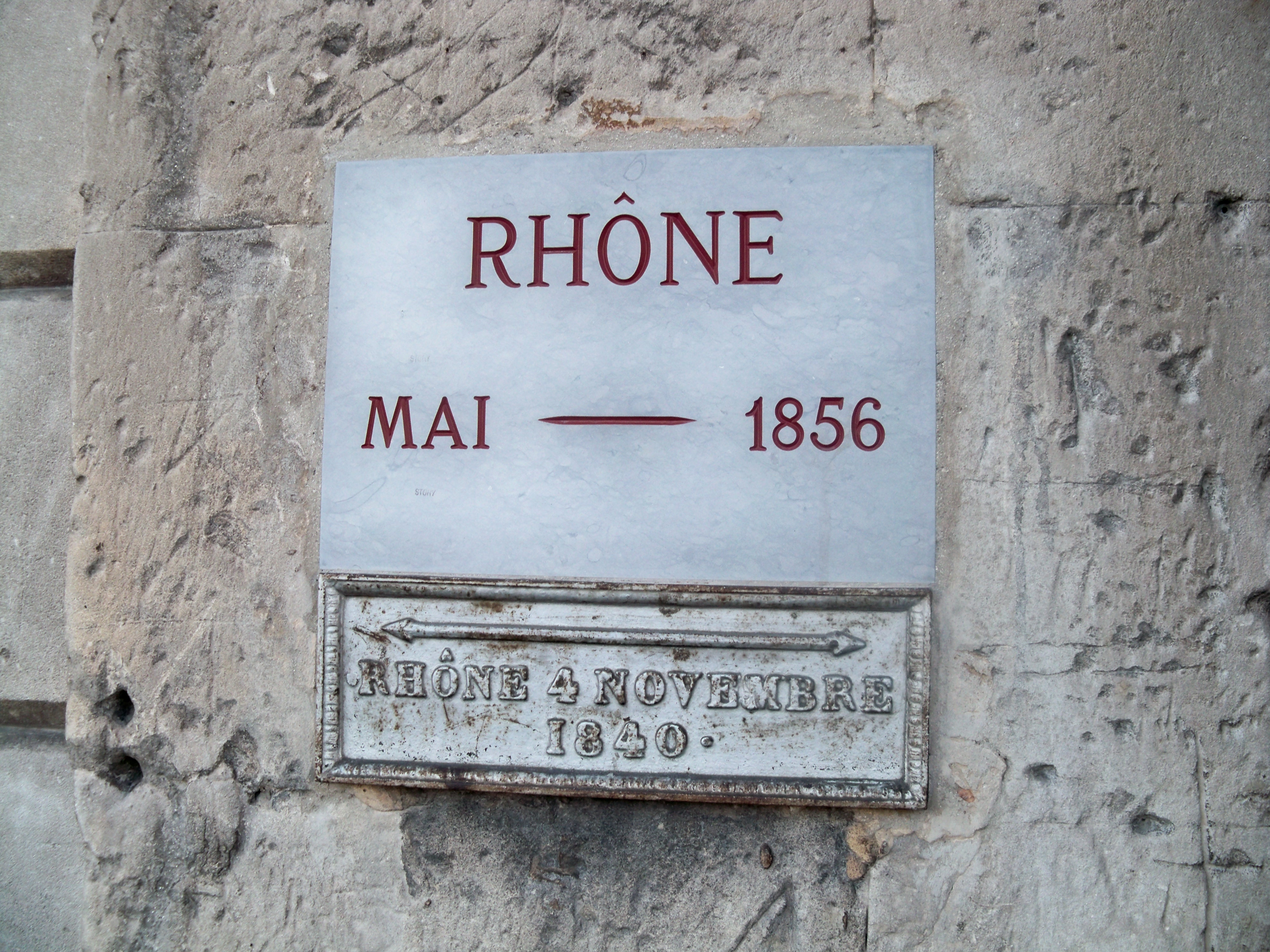 plaques de la hauteur d'inondation à la Porte de la Ligne, à Avignon, Vaucluse : "04-11-1840" environ 1.10 mètre, "Mai 1856" environ 1.50 mètre